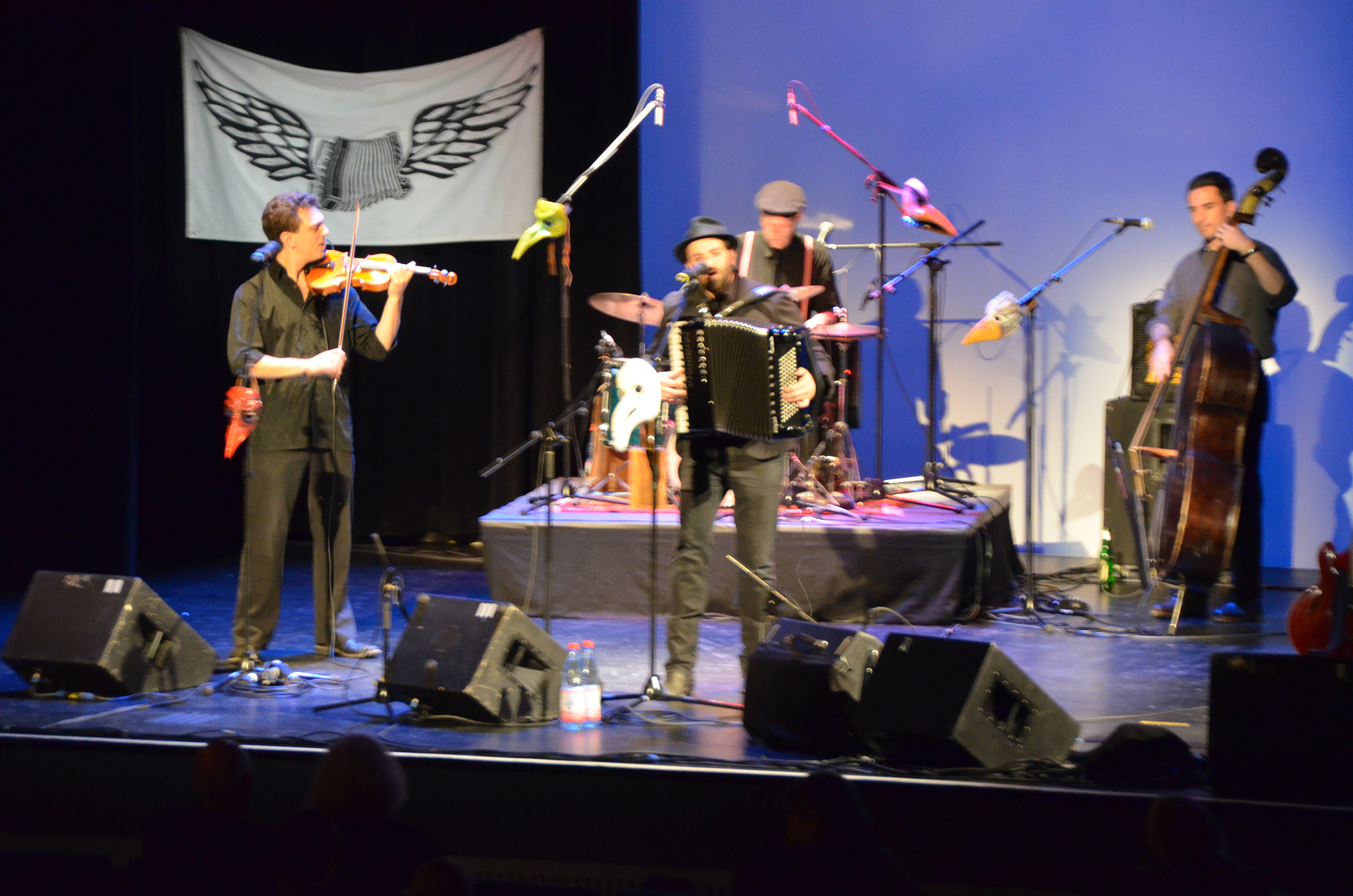 Daniel Kahn & the Painted Bird auf dem Lyrikmarkt Berlin 2015